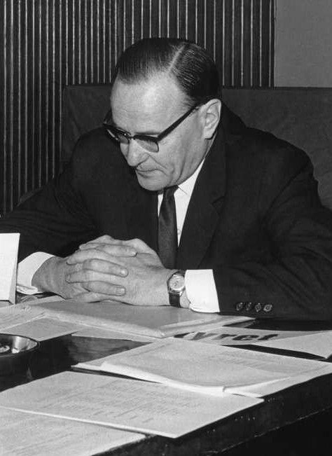 portrett, mann, advokat, sittende ved skrivebord.